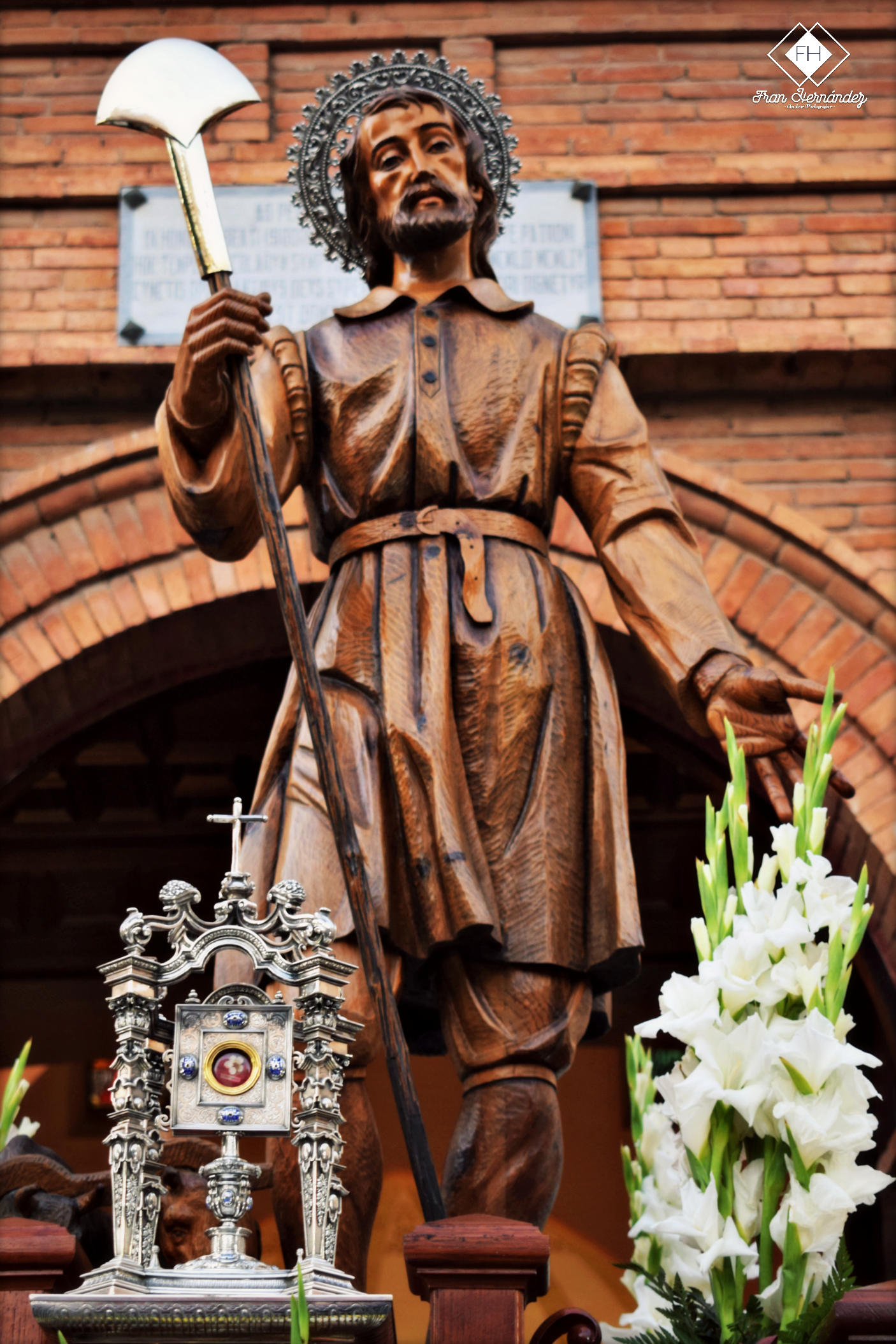 Imagen de San Isidro Labrador de El Ejido Almeria